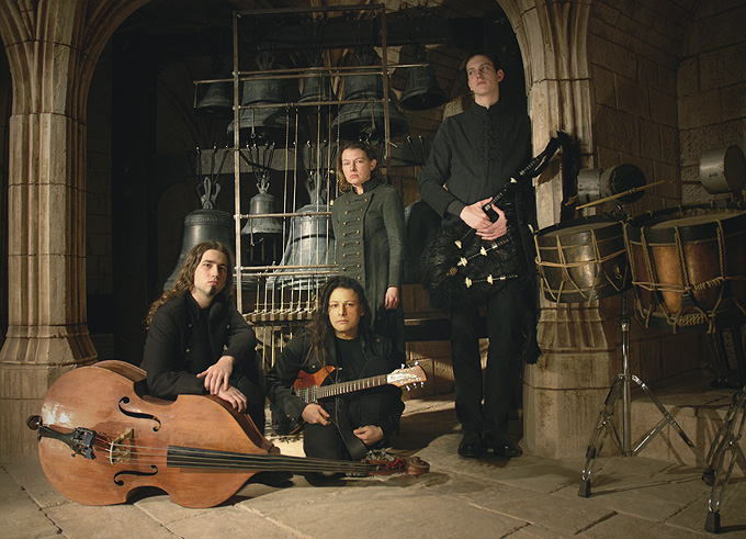 Rosa-Crux, formation 2009 Olivier Tarabo / Chant, guitare Claude Feeny / Claviers, Carillon Hugo Lafitte / Contrebasse Benjamin Canu / Cornemuse